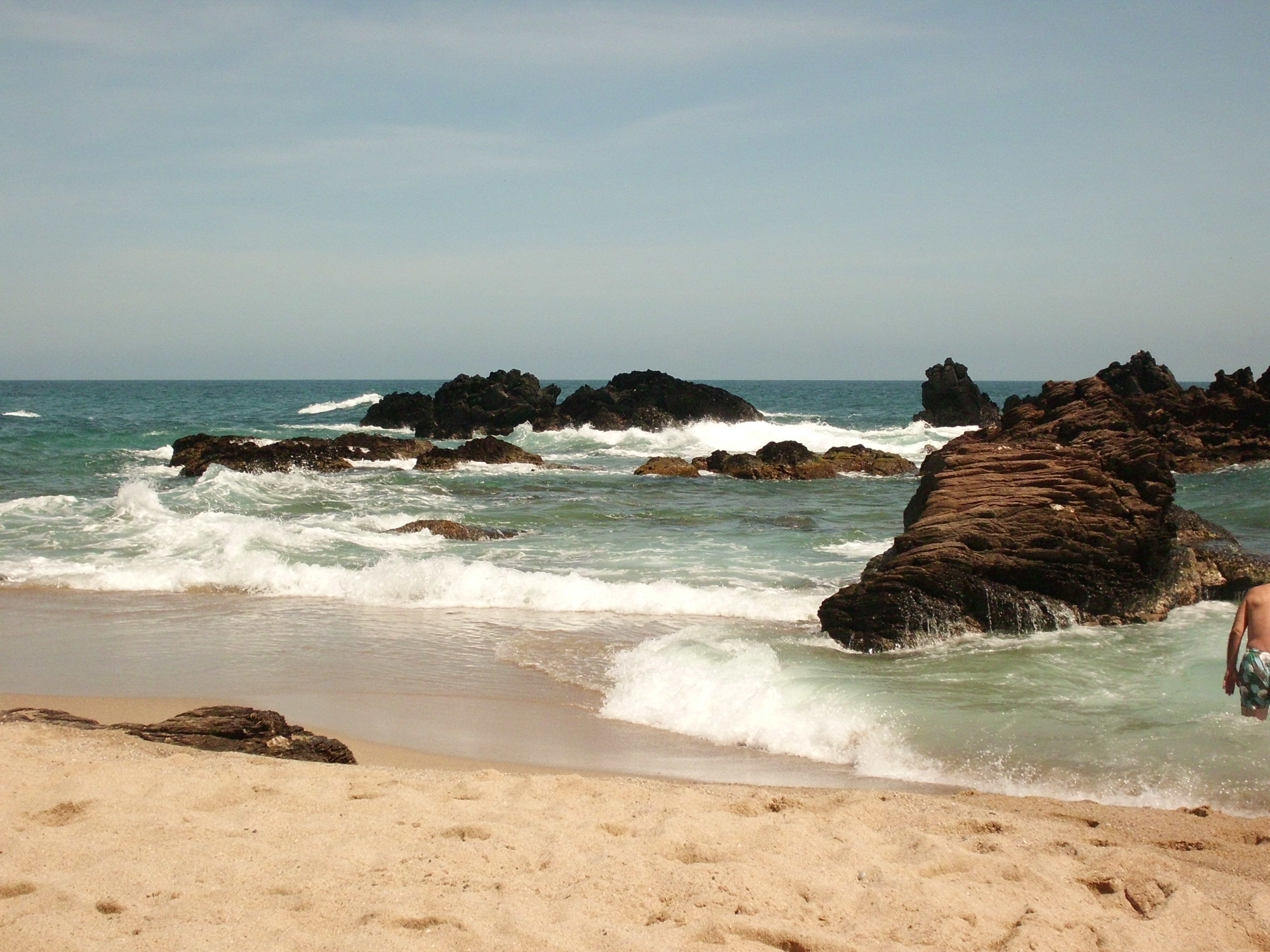 Playa Caiman, estaddo Miranda